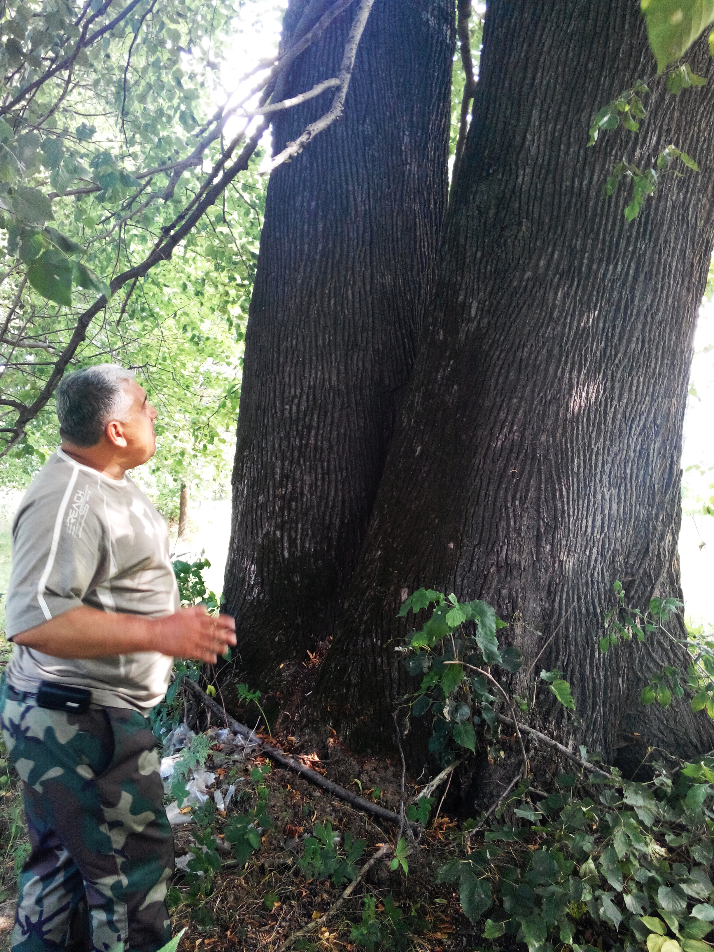 Віковічні липи на території заказника